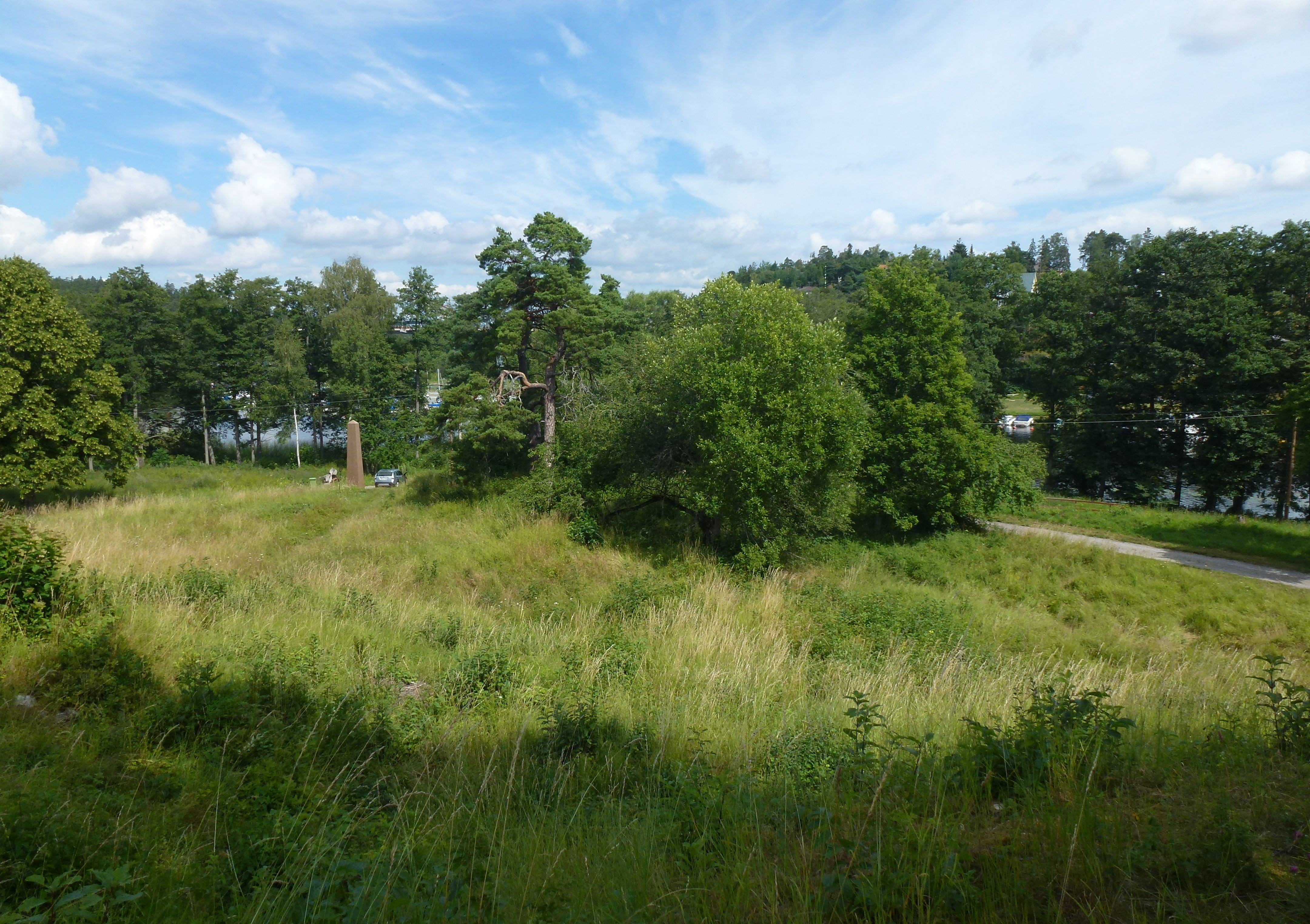 Stäketsholmen vy från ruinhögen mot norr